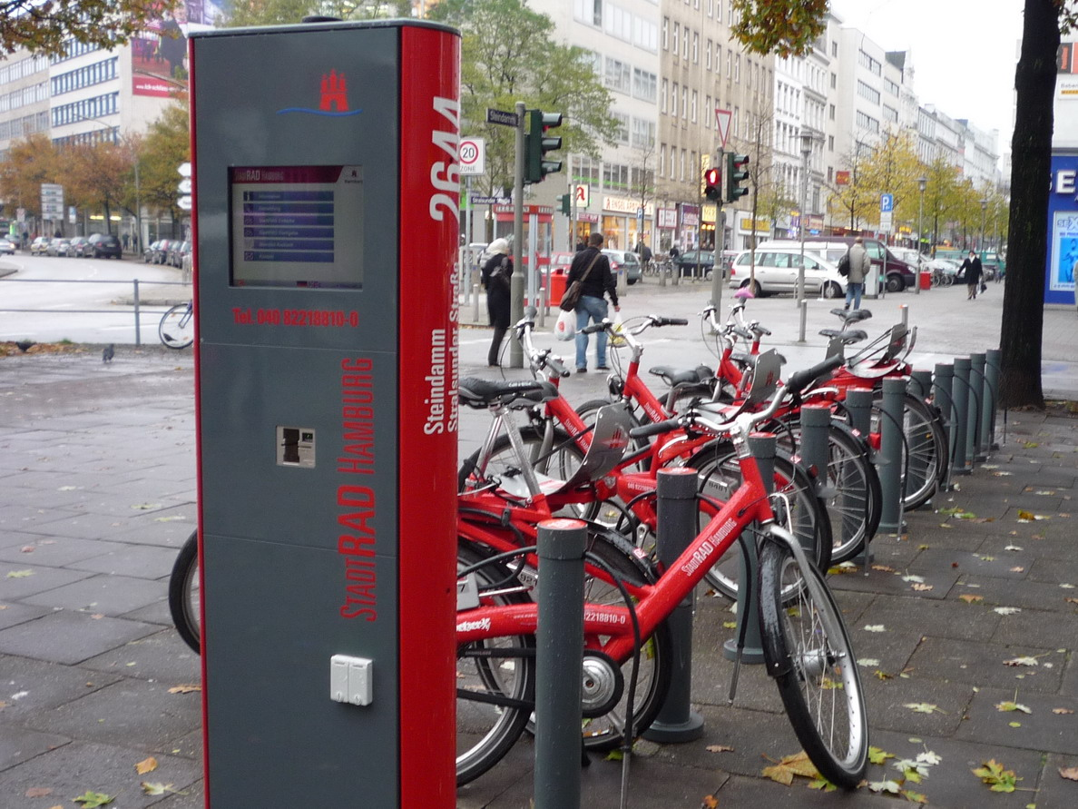 Stadtrad-Station in St. Georg mit den markanten Rädern der Deutschen Bahn in der roten Hamburger Ausführung